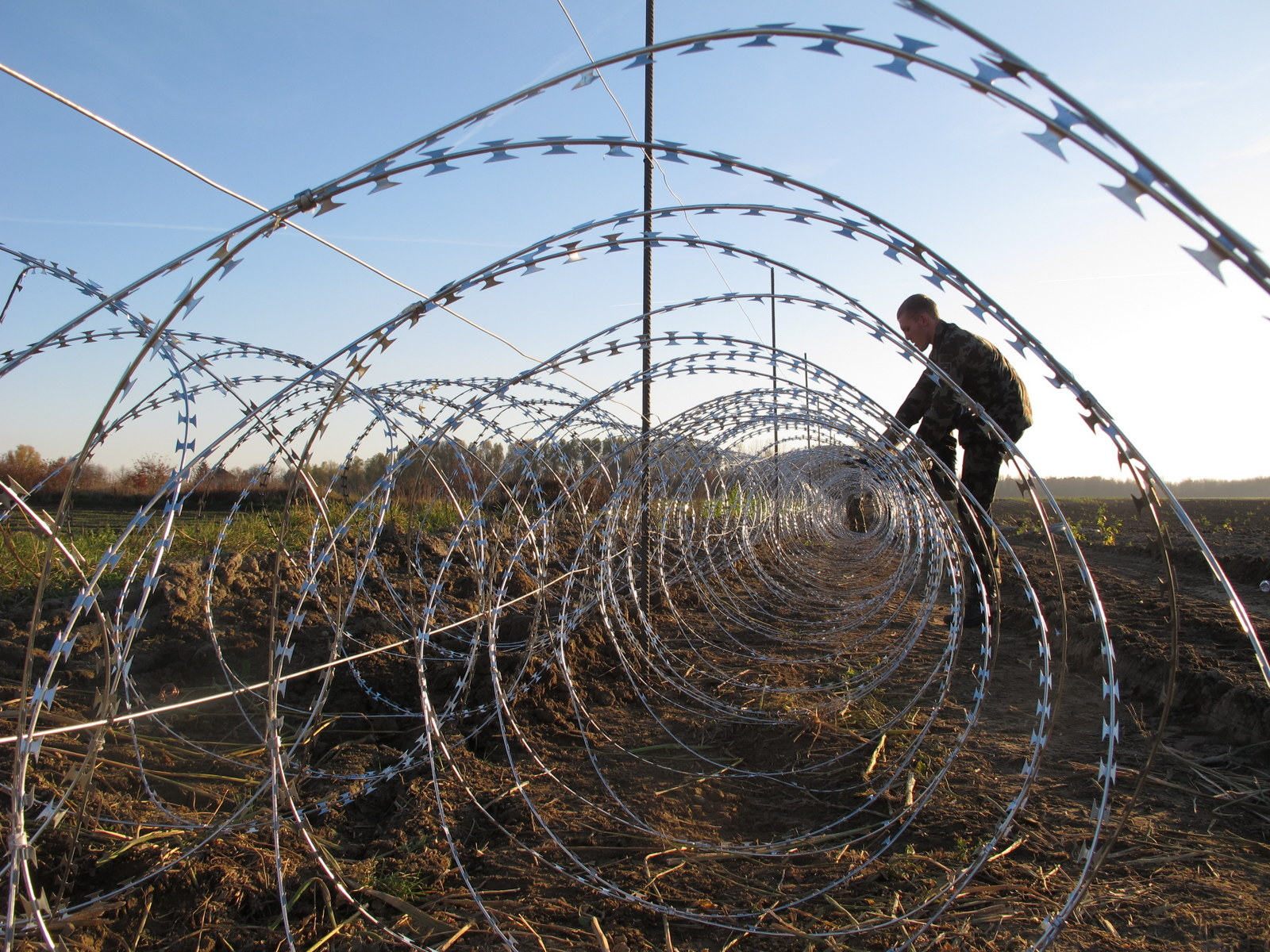 Pripadniki Slovenske vojske med postavljanjem bodeče oziroma rezilne žice na meji s Hrvaško, Središče ob Dravi, november 2015. Ministrica obiskala pripadnike Slovenske vojske in URSZR, ki pomagajo v nastanitvenem centru in na meji.